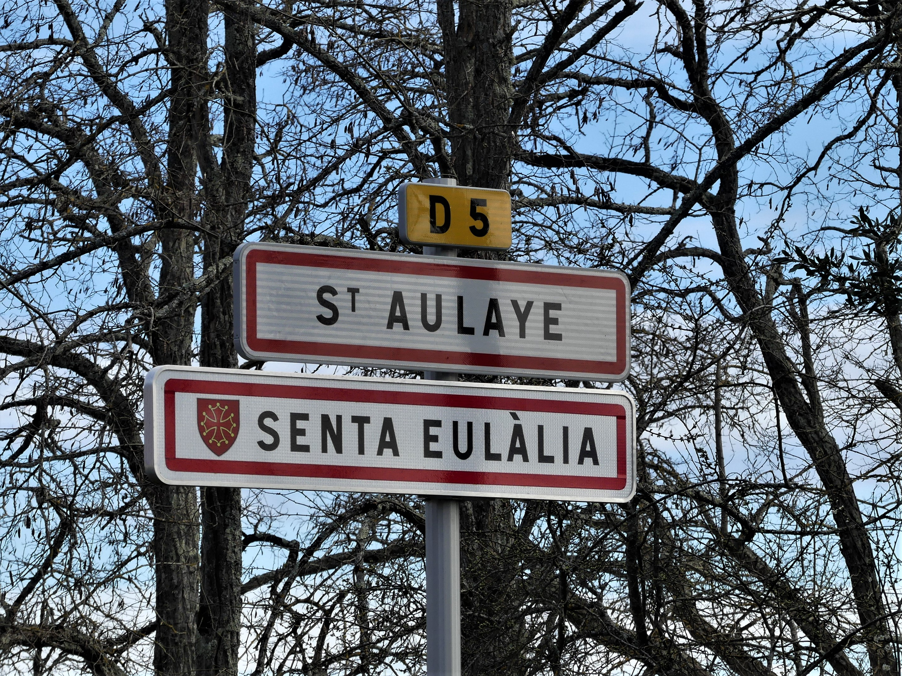 Panneau d'entrée à Saint-Aulaye en français et occitan, Saint-Aulaye-Puymangou, Dordogne, France.